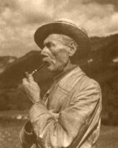 Portrait de Lazar Drljaca